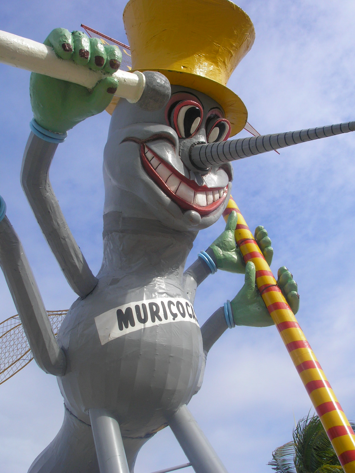 Imagem do bloco das Muriçocas em João Pessoa (PB).